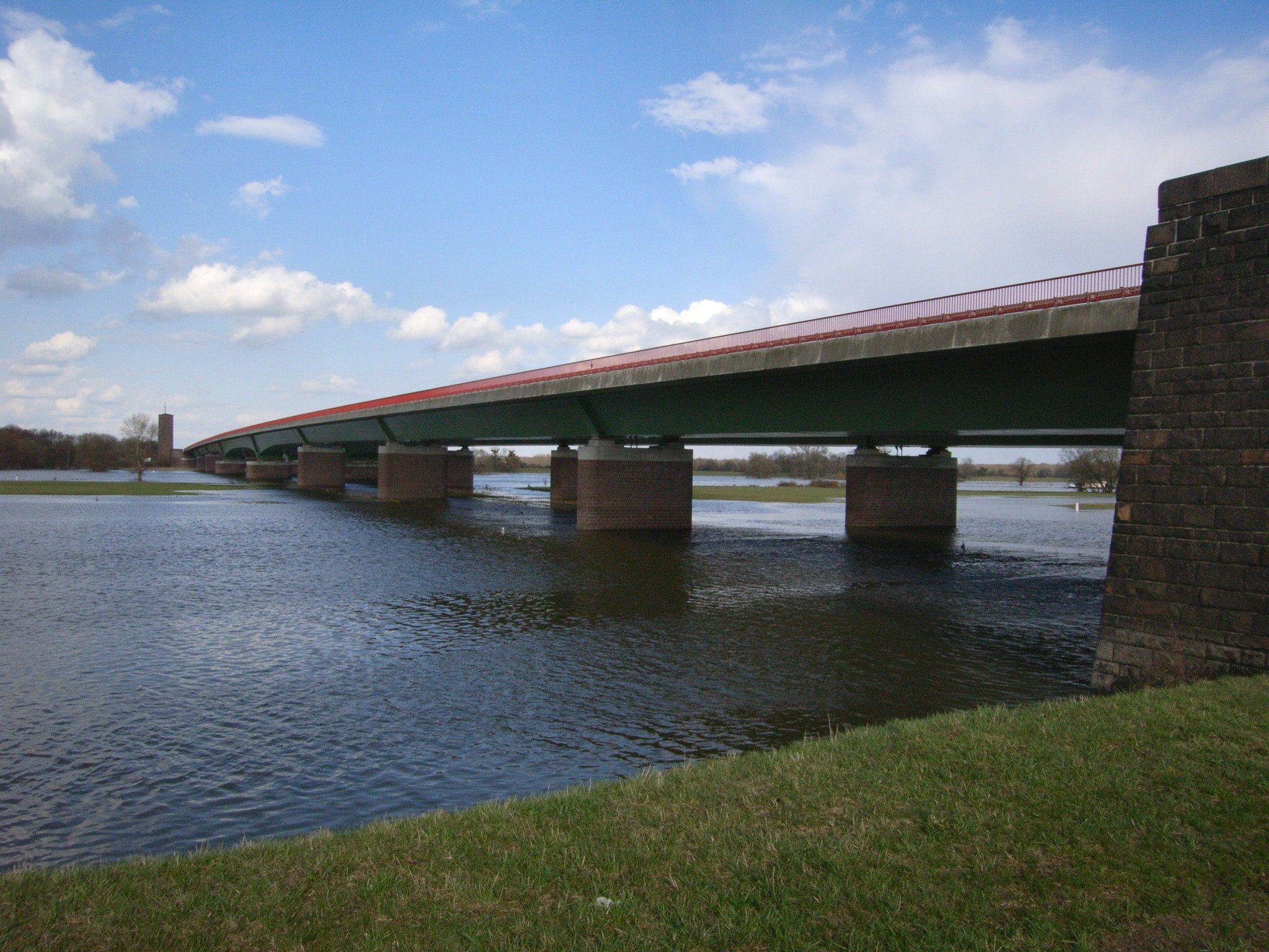 Elbebrücke Vockerode,Hochwasser 2006